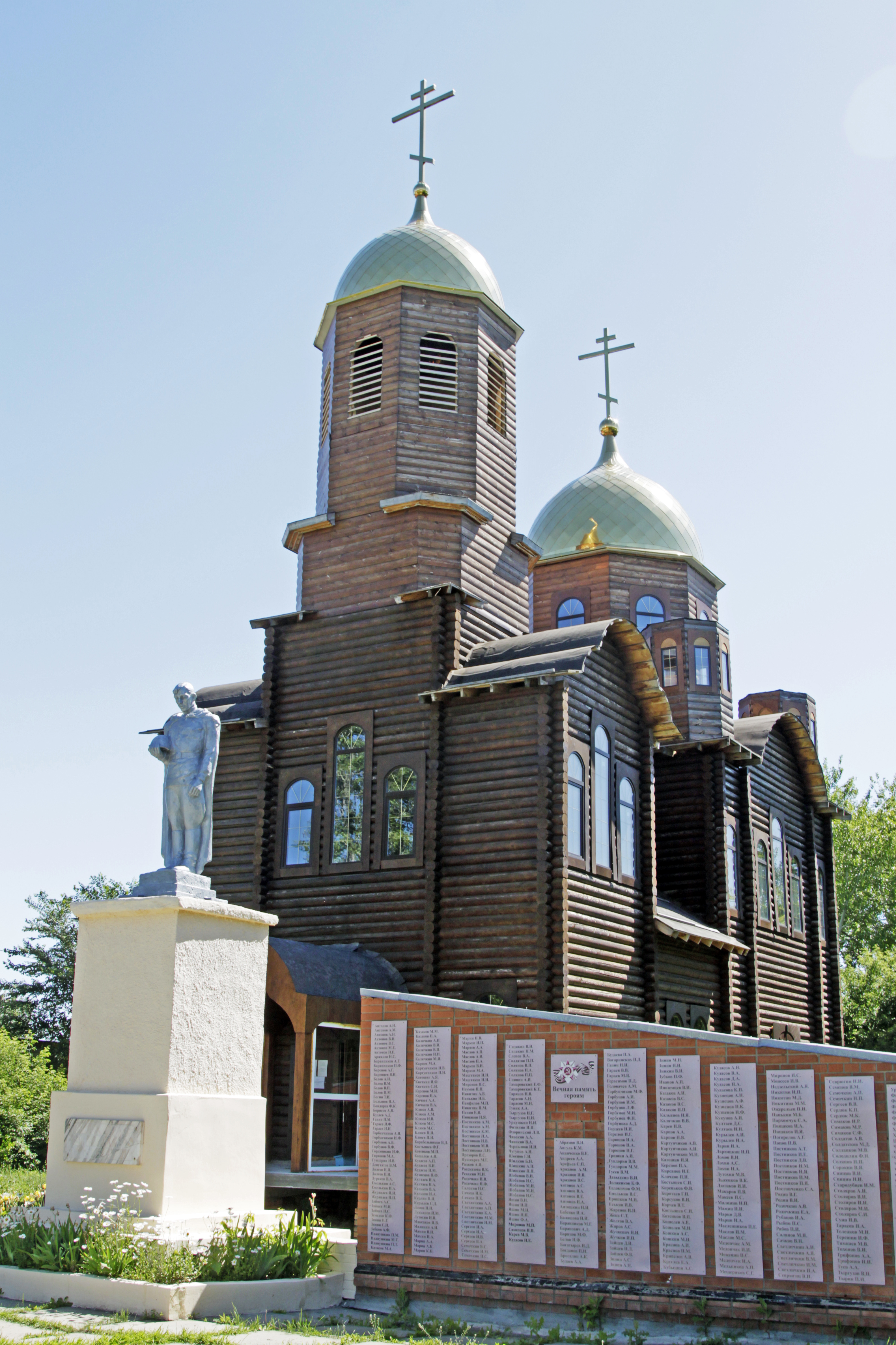 Волжский район, с. Дубовый Умет, ул. Фрунзе, 130. Русская Православная Церковь, Самарская митрополия, Самарская епархия, Новокуйбышевское благочиние.